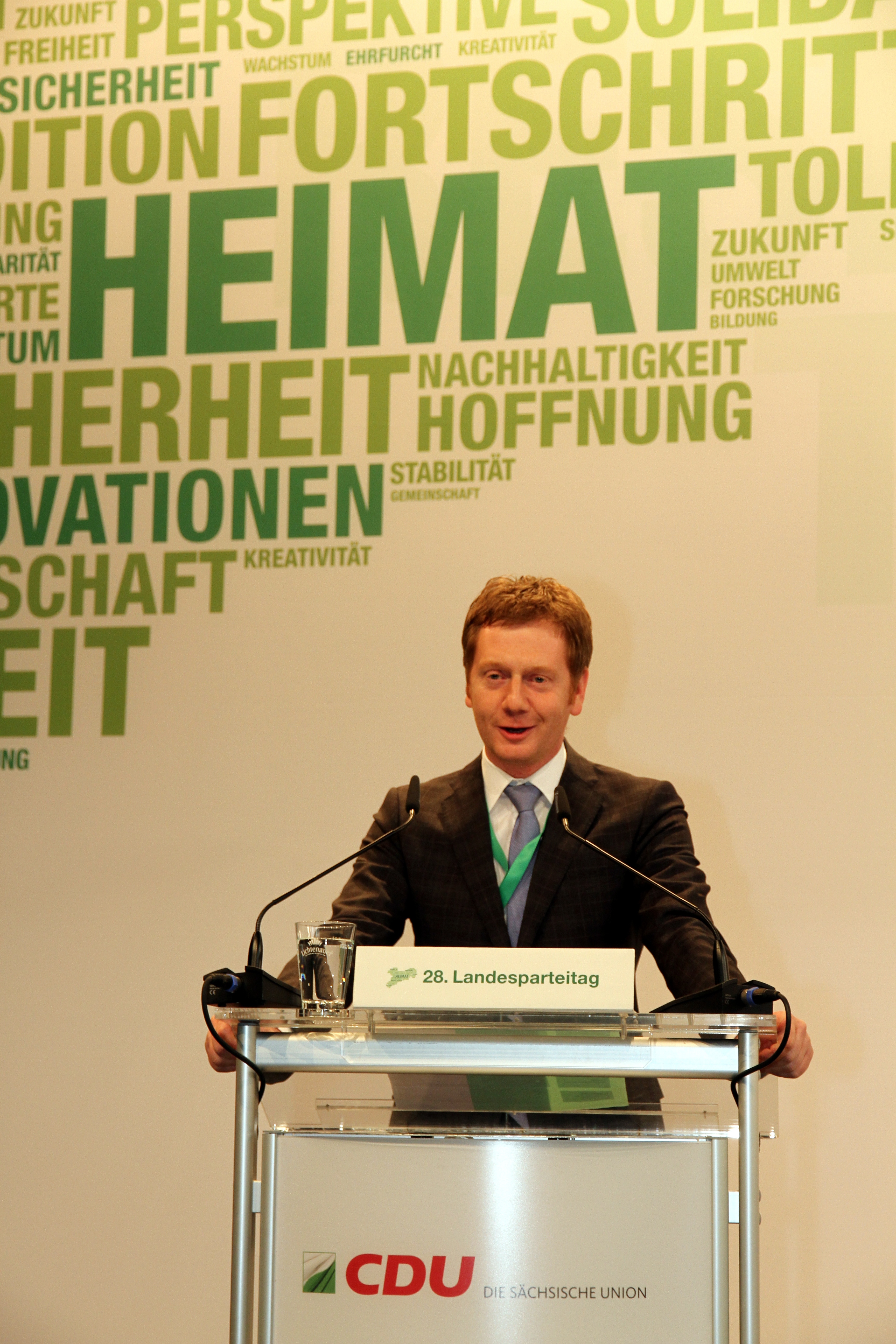 Michael Kretschmer beim 28. Landesparteitag der Sächsischen Union Union am 9. November 2013 in Chemnitz